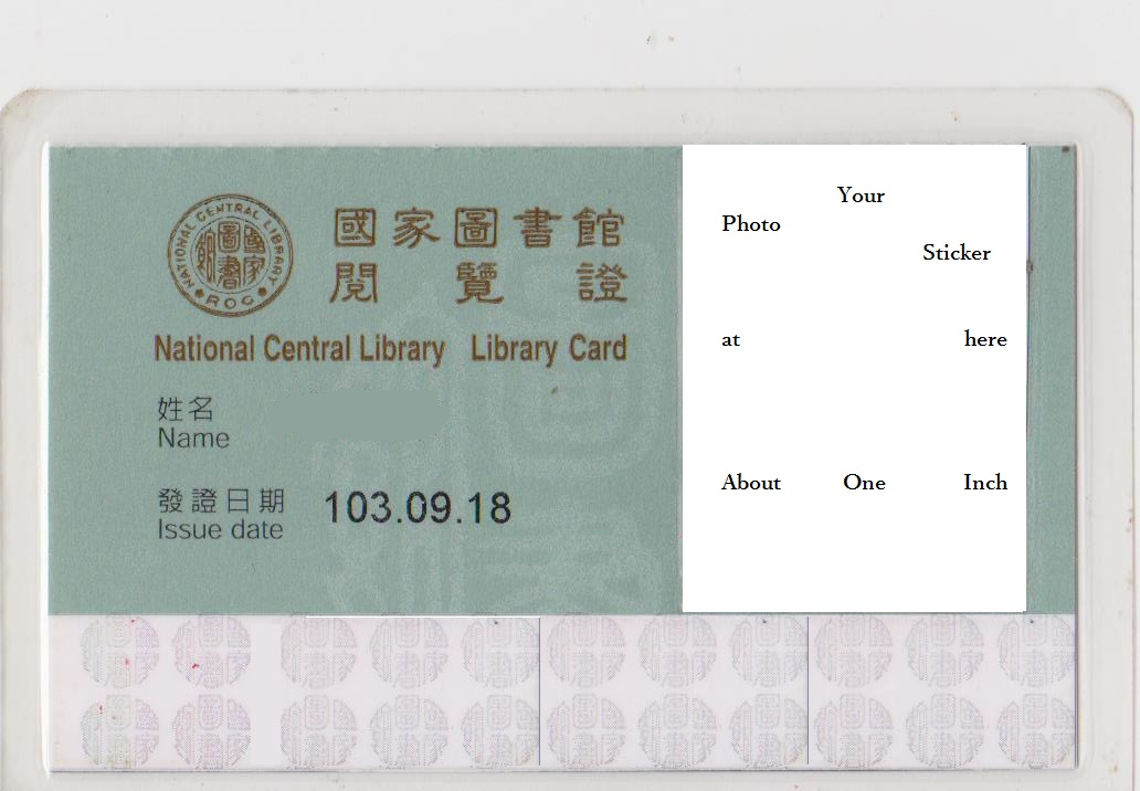 中華民國國家圖書館閱覽證正面，2014年9月18日發證，下方列印閱覽證號條碼，閱覽證號為1個英文字母加11位數字。